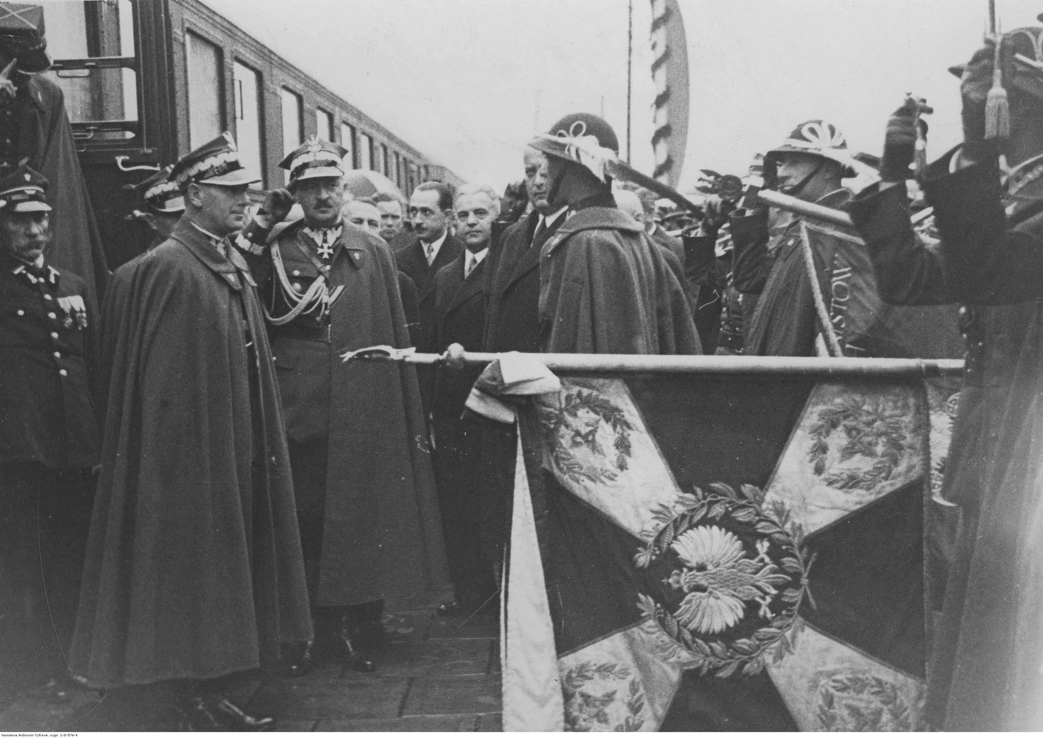 Powrót Generalnego Inspektora Sił Zbrojnych RP generała Edwarda Rydza-Śmigłego po złożeniu wizyty oficjalnej we Francji - generał Edward Rydz-Śmigły przyjmuje raport od oficera 4 Pułku Strzelców Podhalańskich na peronie stacji w Zebrzydowicach. Obok widoczny generał Janusz Głuchowski, na pierwszym planie sztandar pułku; wrzesień 1936. Koncern Ilustrowany Kurier Codzienny - Archiwum Ilustracji. Sygnatura: 1-D-576-4